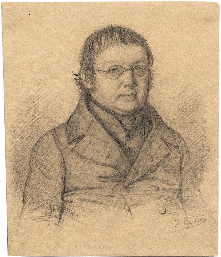 Selbstbildnis mit Augengläsern. Bleistift auf Velin. 22,2 x 18,4 cm, / München den 28 August 1842